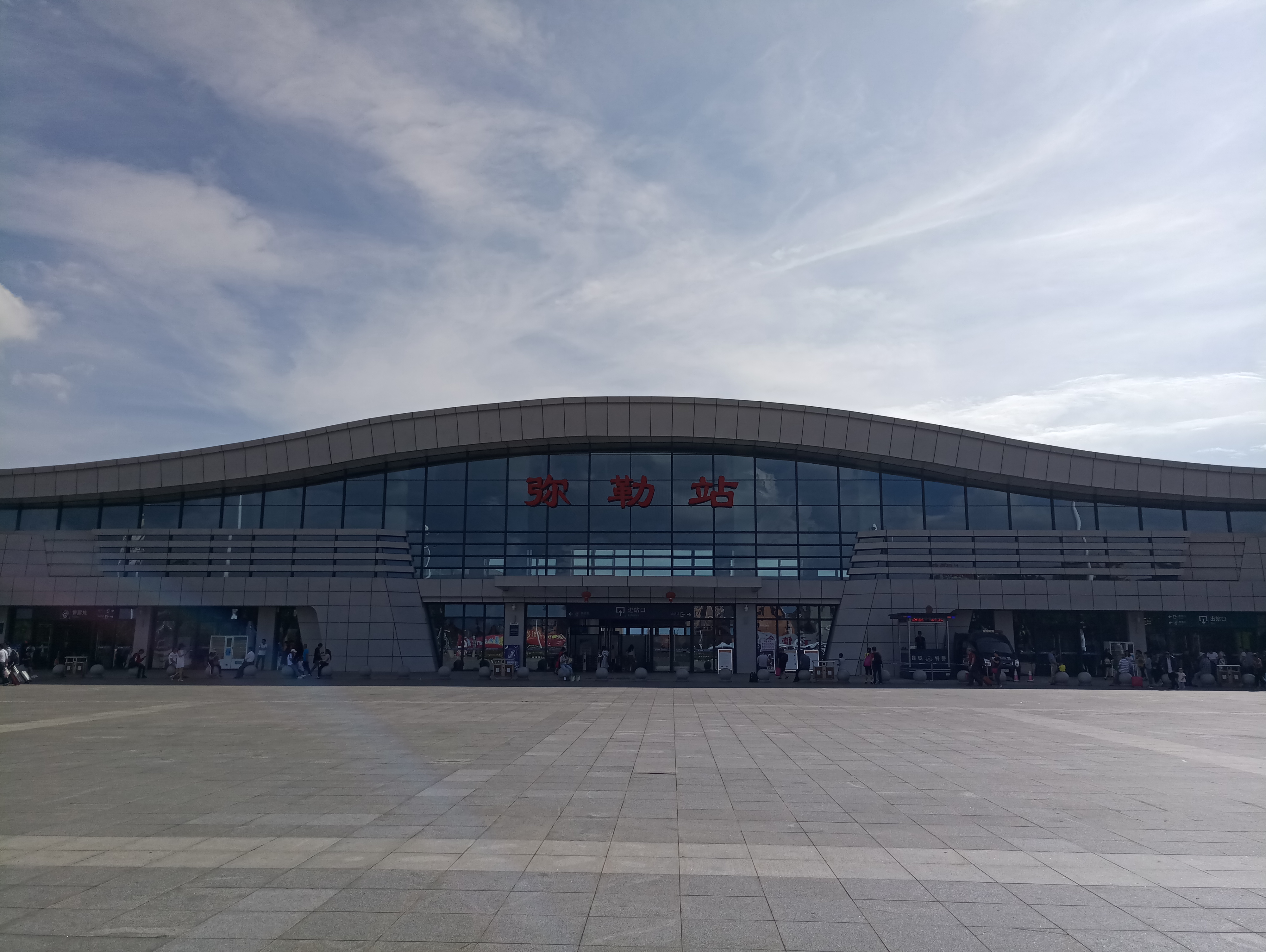 中文（中国大陆）: 云南省弥勒市弥勒站